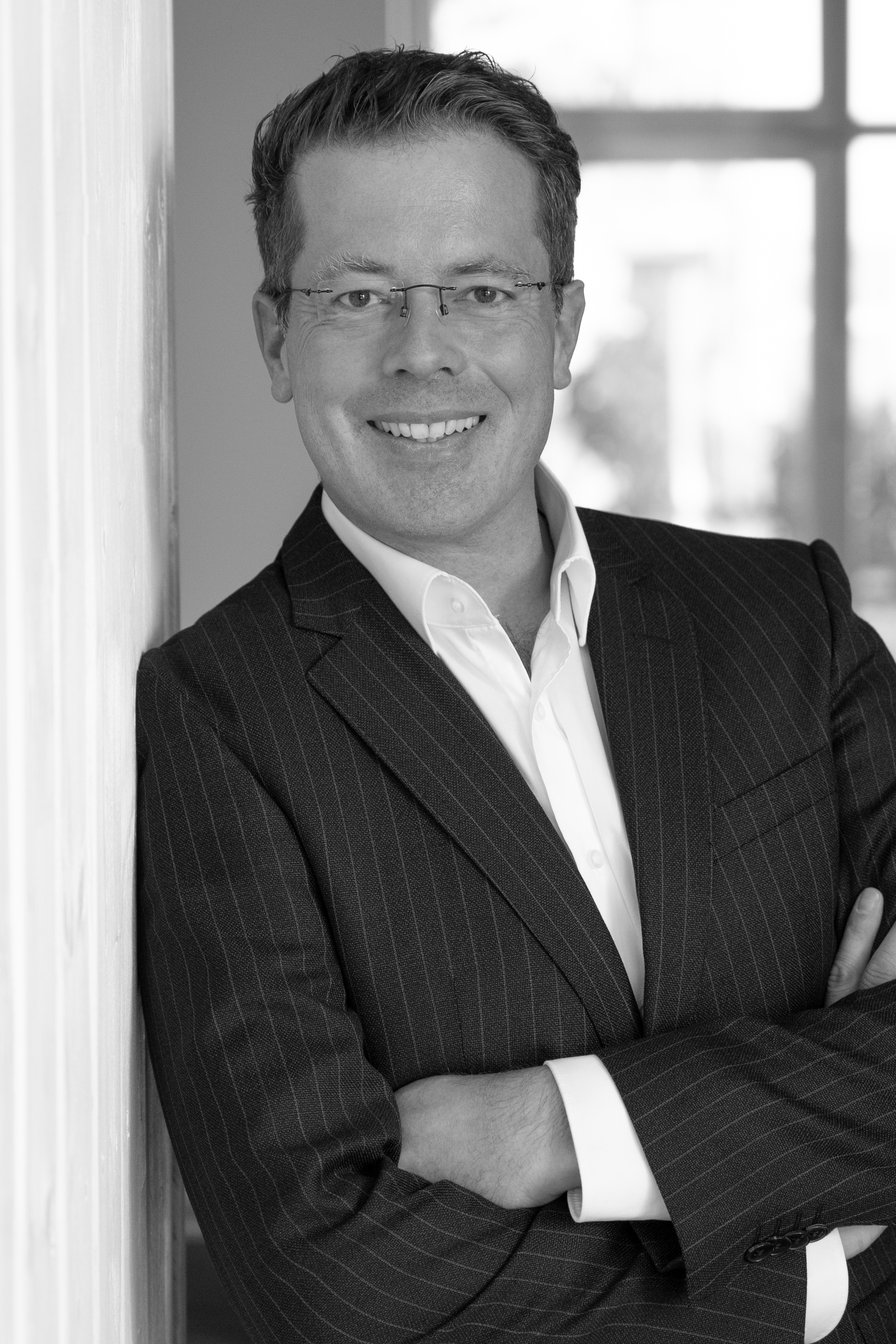 Matthias von Hauff